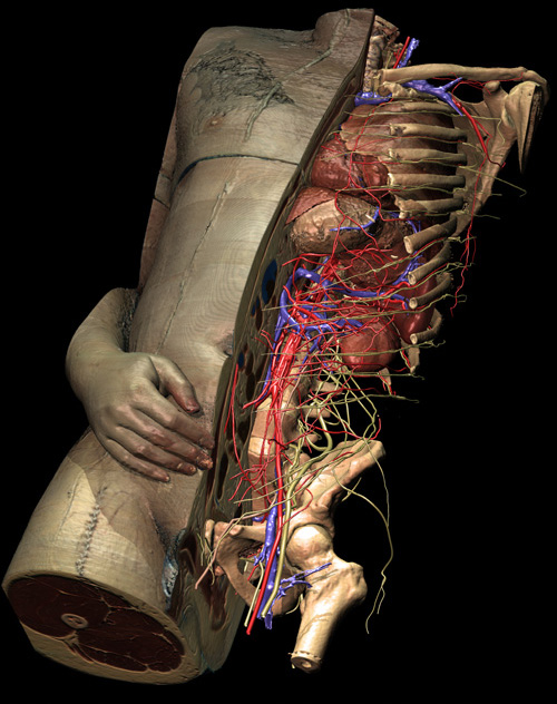 Menschlicher Torso rekonstruiert aus den Daten des Visible Human Projekts